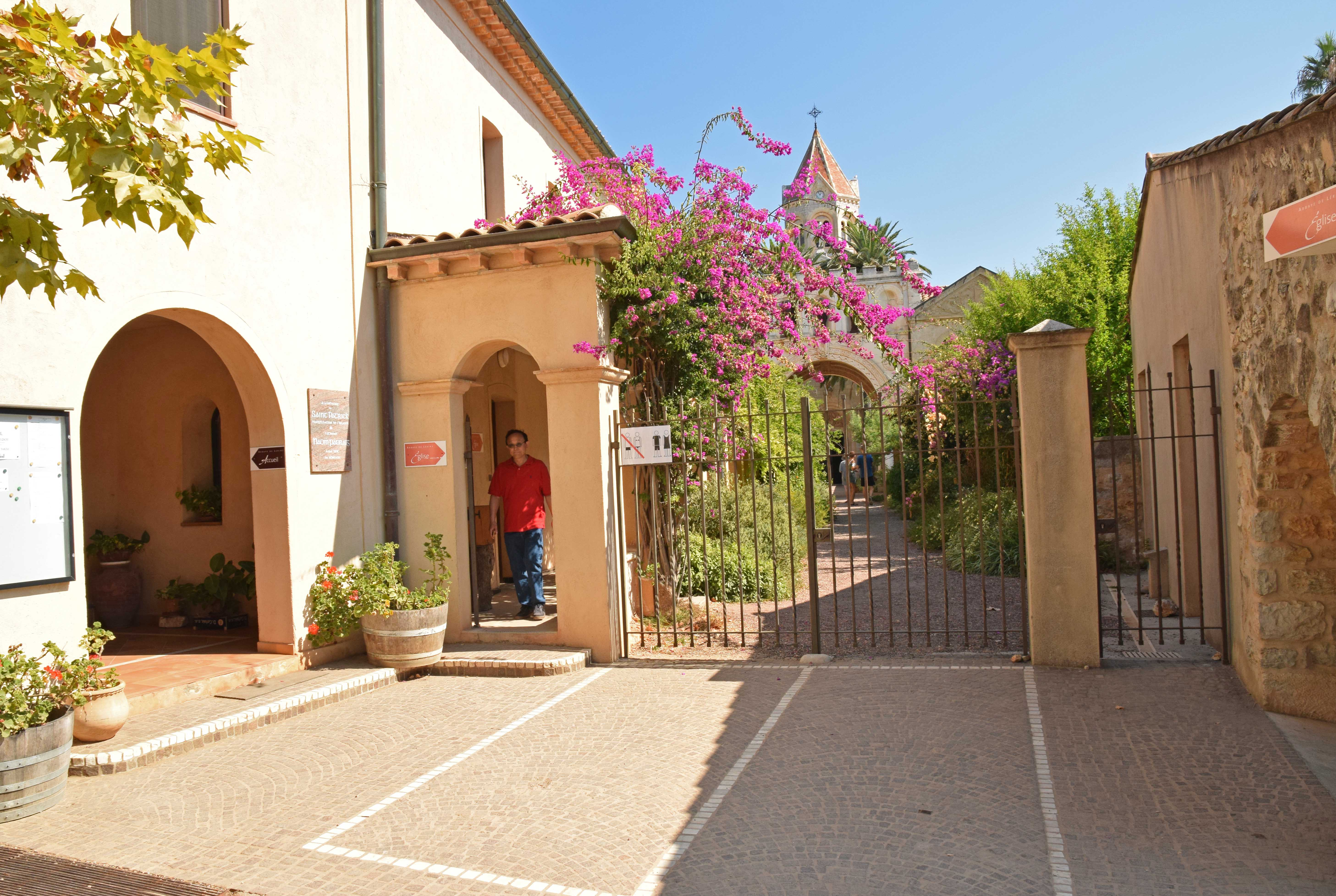 Abbaye de Lérins, Île Saint-Honorat